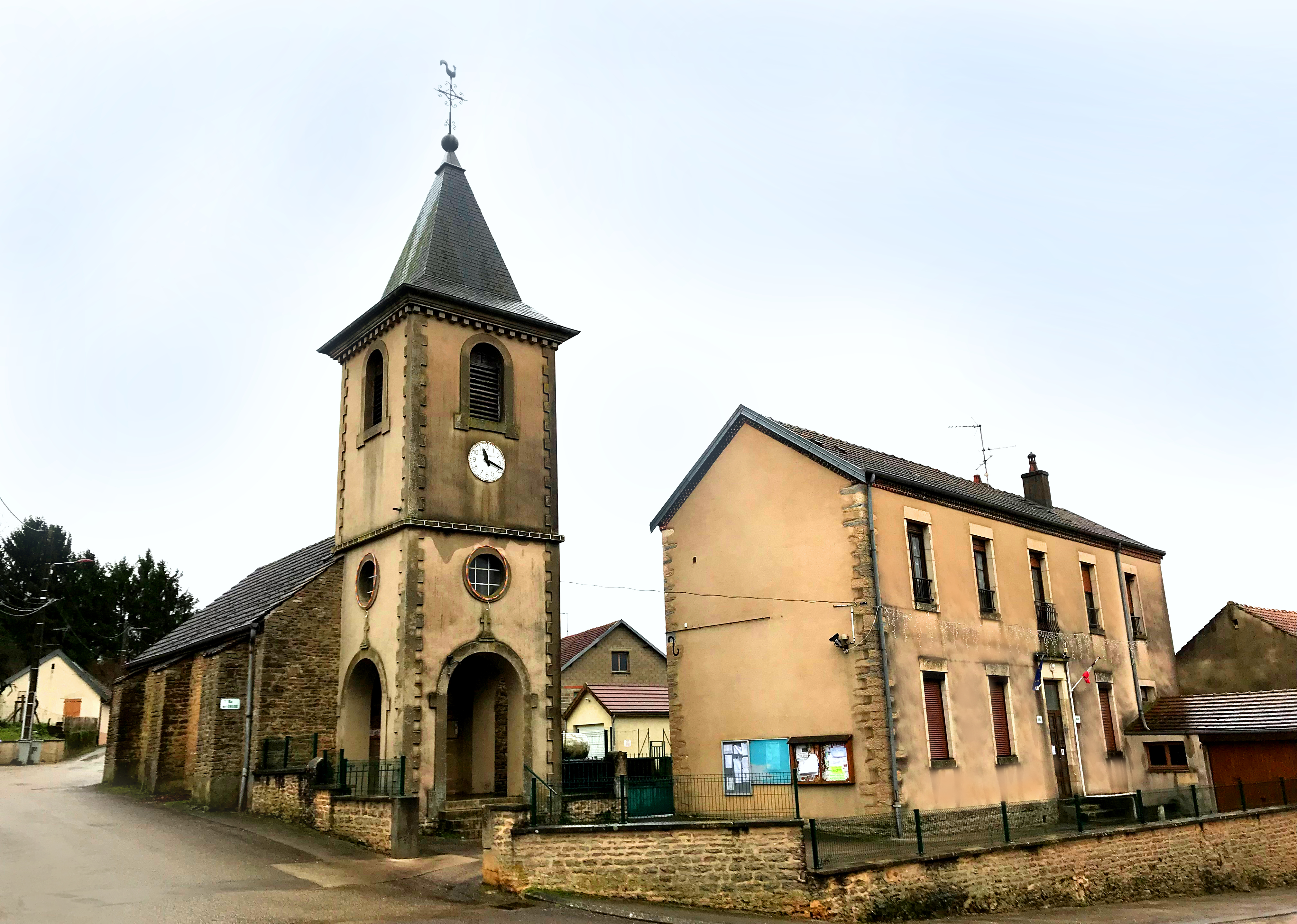 Romange (Jura, France) en janvier 2018.